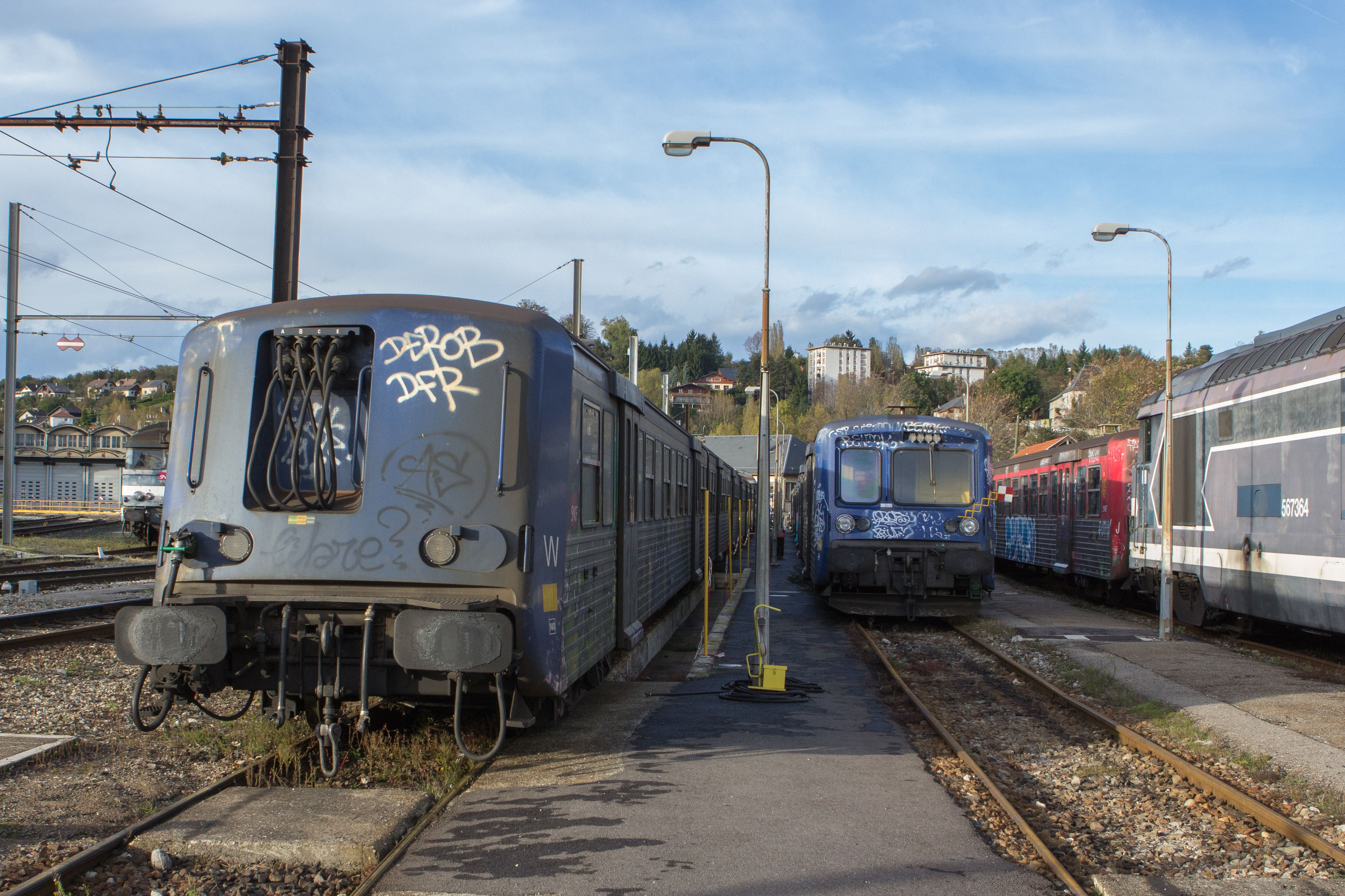 Rame réversible régionale (RRR) au dépot SNCF de Chambéry / Chambéry, Savoie, France